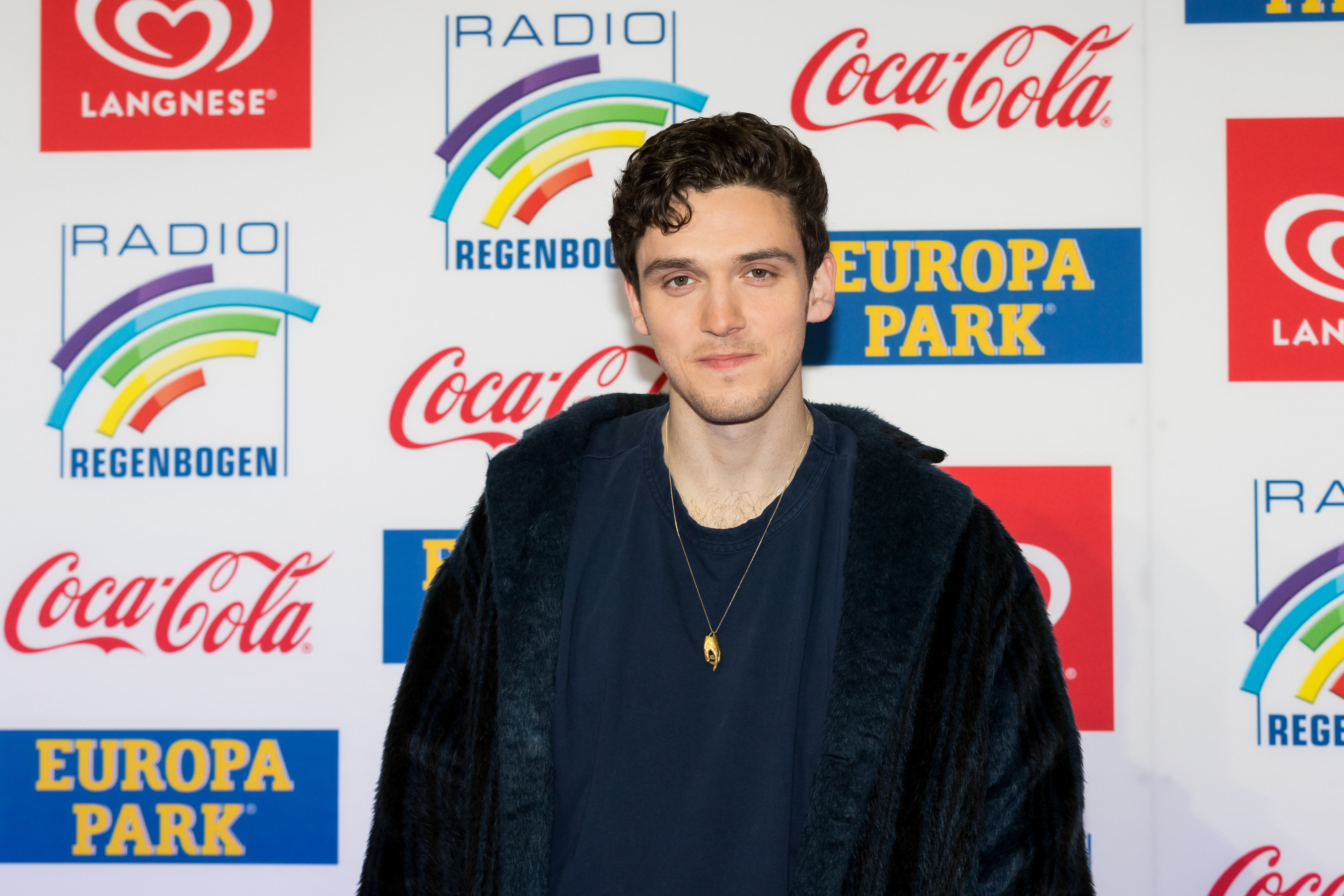 during Radio Regenbogen Award 2018 at Europapark, Rust, Baden-Württemberg, Germany on 2018-03-23, Photo: Sven Mandel